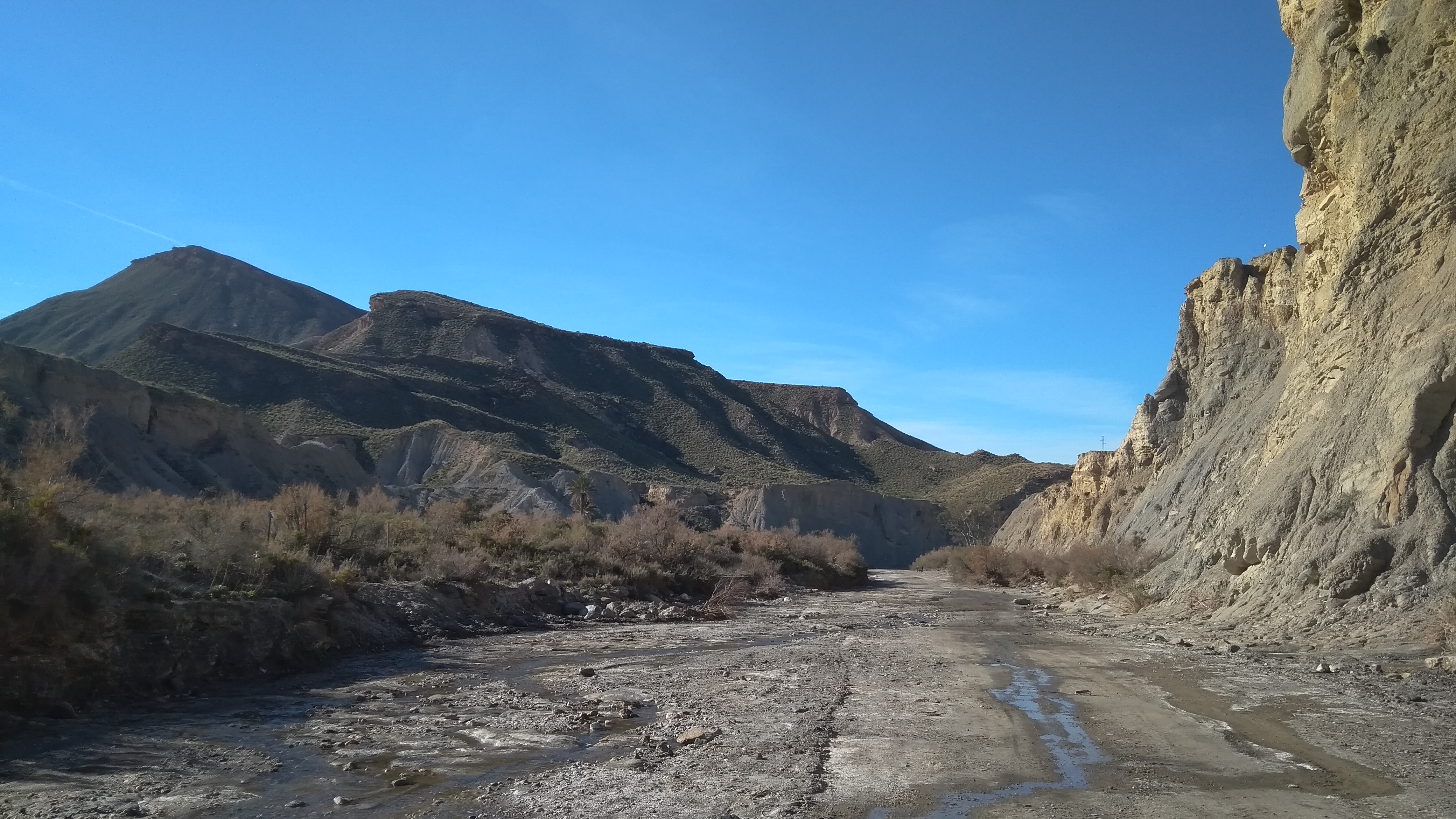 Paisaje de la rambla de Tabernas, Almería, en la ruta PR-A 269.